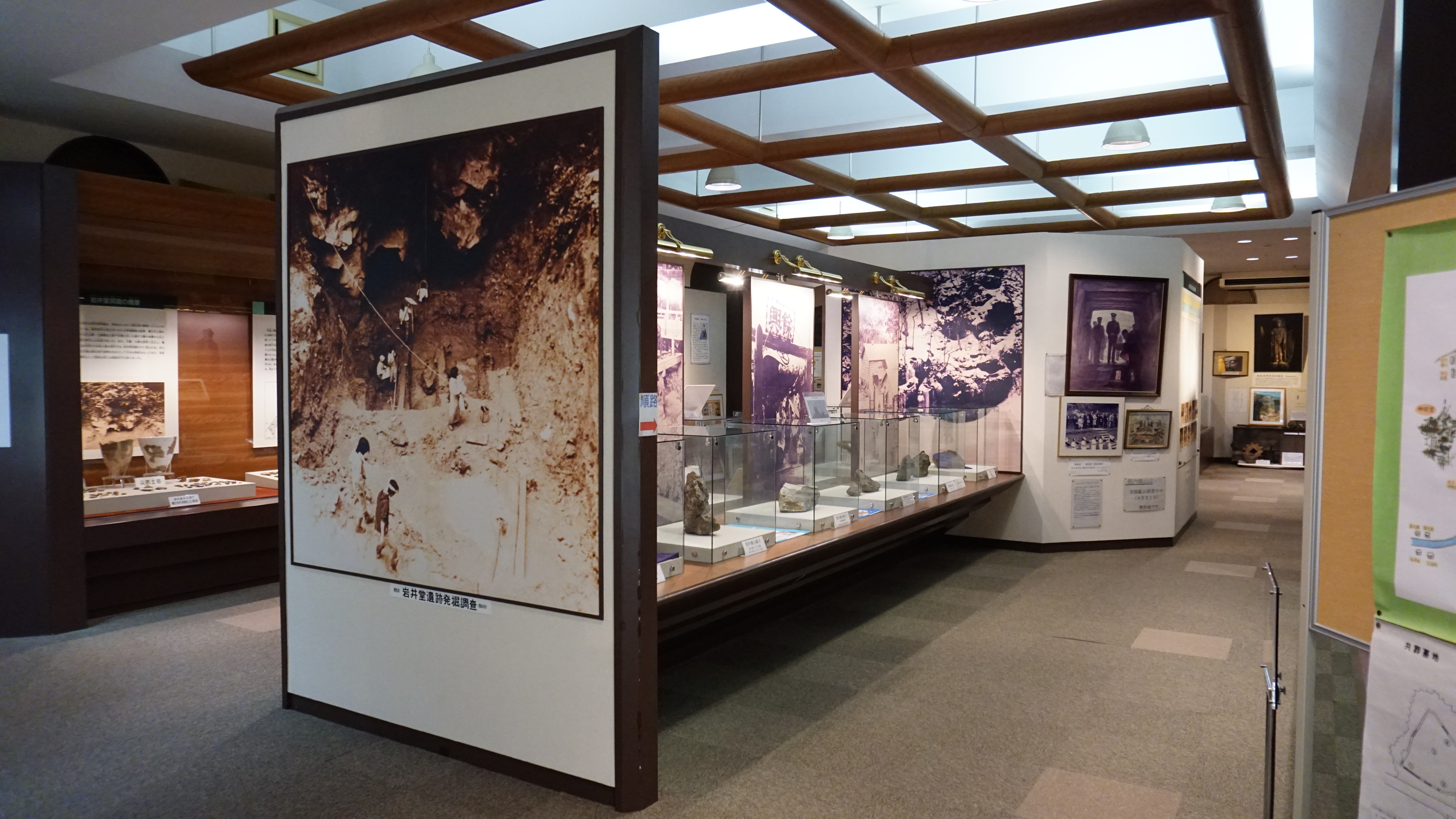 院内銀山異人館館内